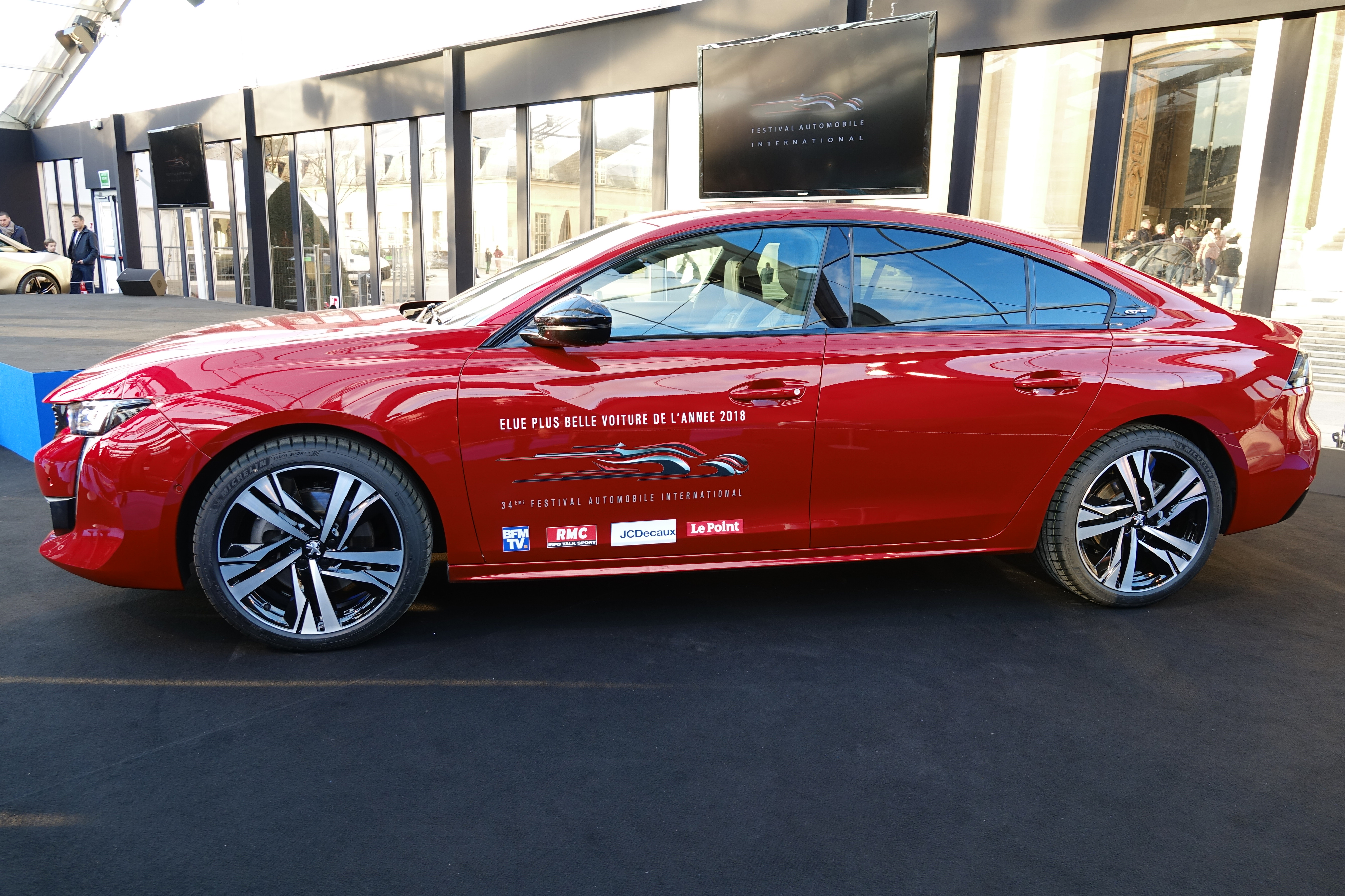 Elue plus belle voiture de l'année 2018